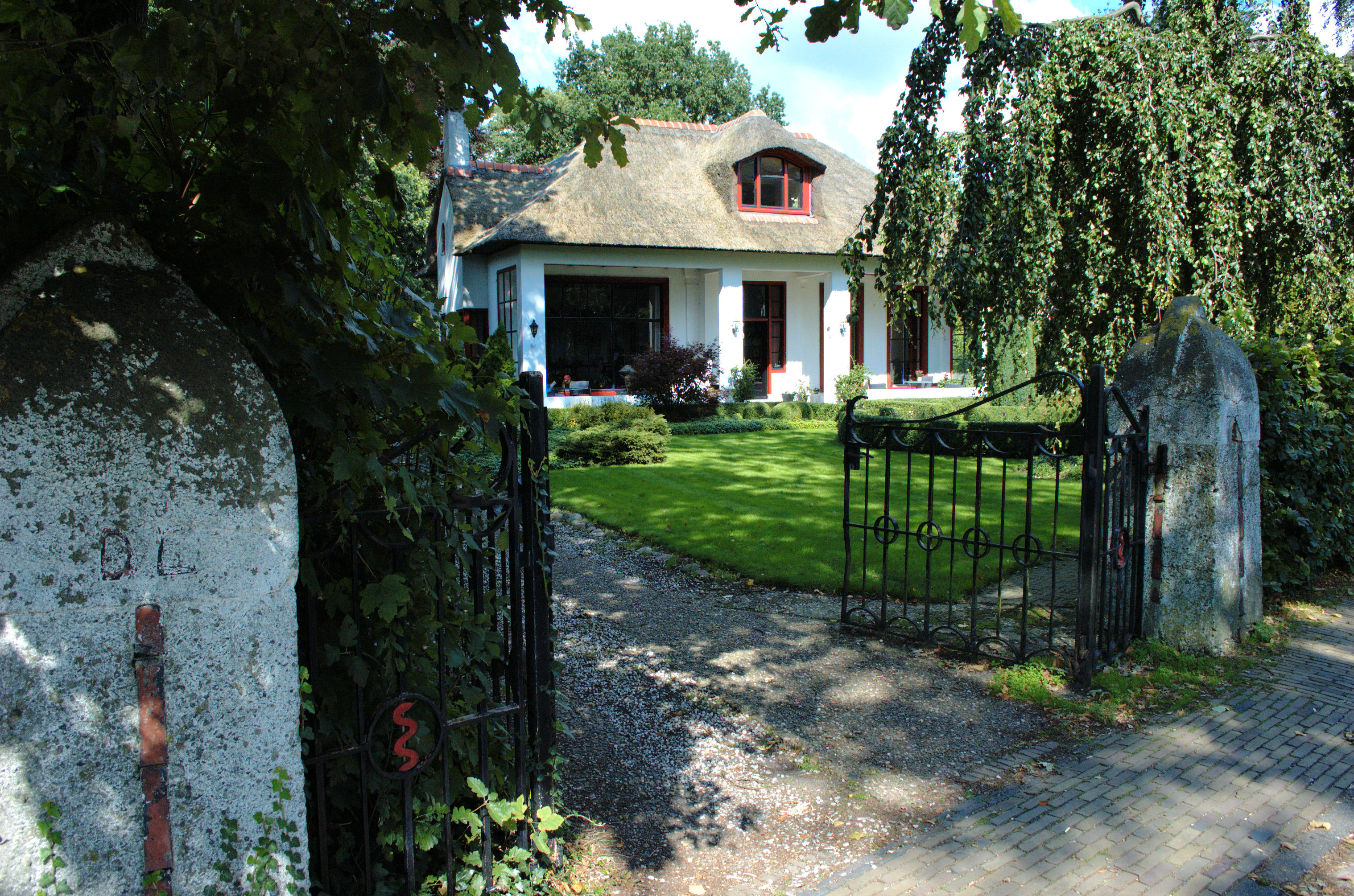 Villa De Beuk, Schoolstraat 59, Burgum